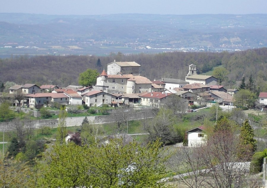 Saint André en Royans (Isère) vue générale du village en 2006 photo prise par JCRomey libre de droit